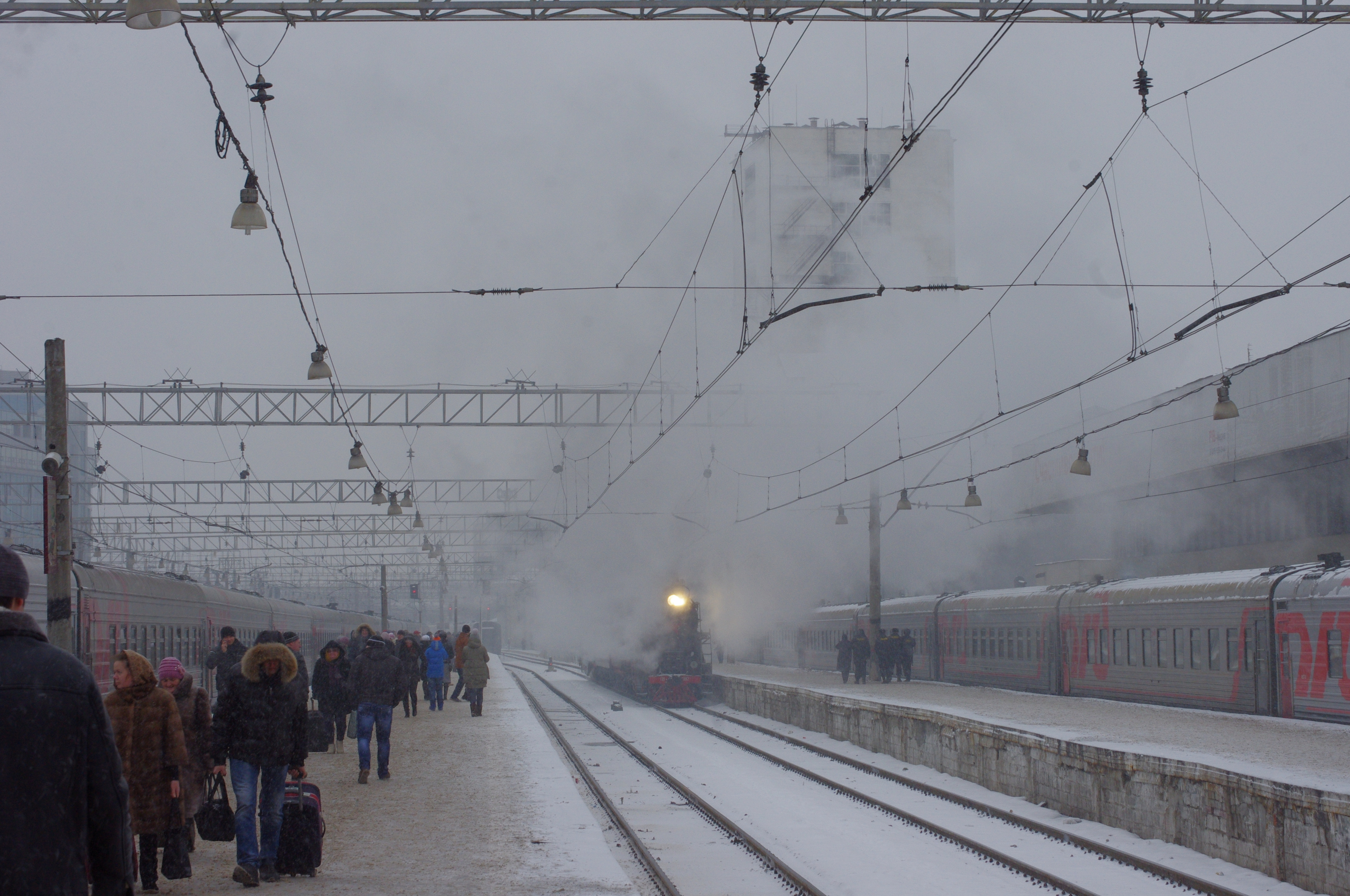 Паровозы П36-0120 + ЛВ-0182 с ретро-поездом "Вокзалы Москвы" 9.01.2015.